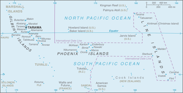 Kiribati map